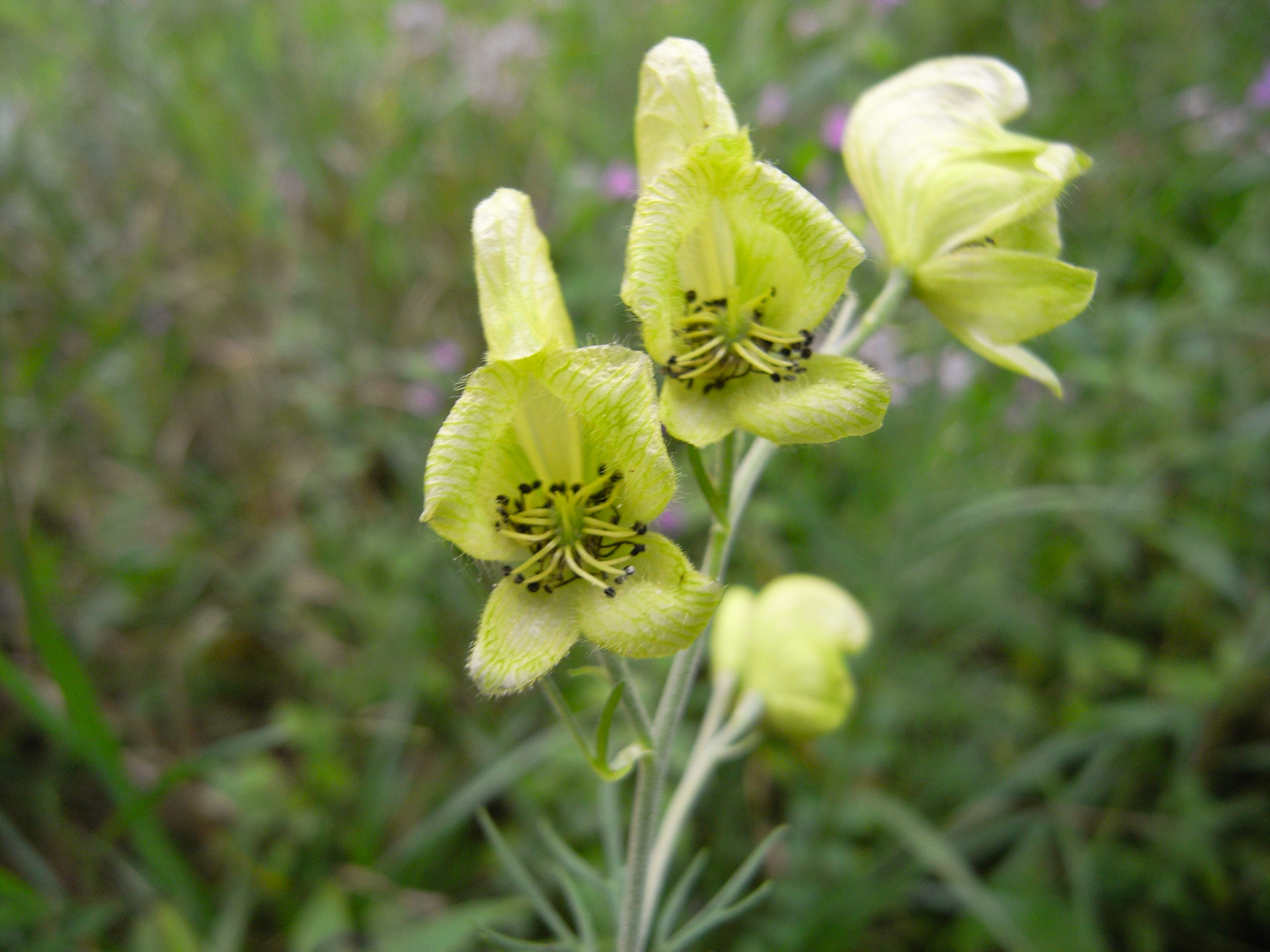 Aconitum anthora Blassgelber Eisenhut Blüte